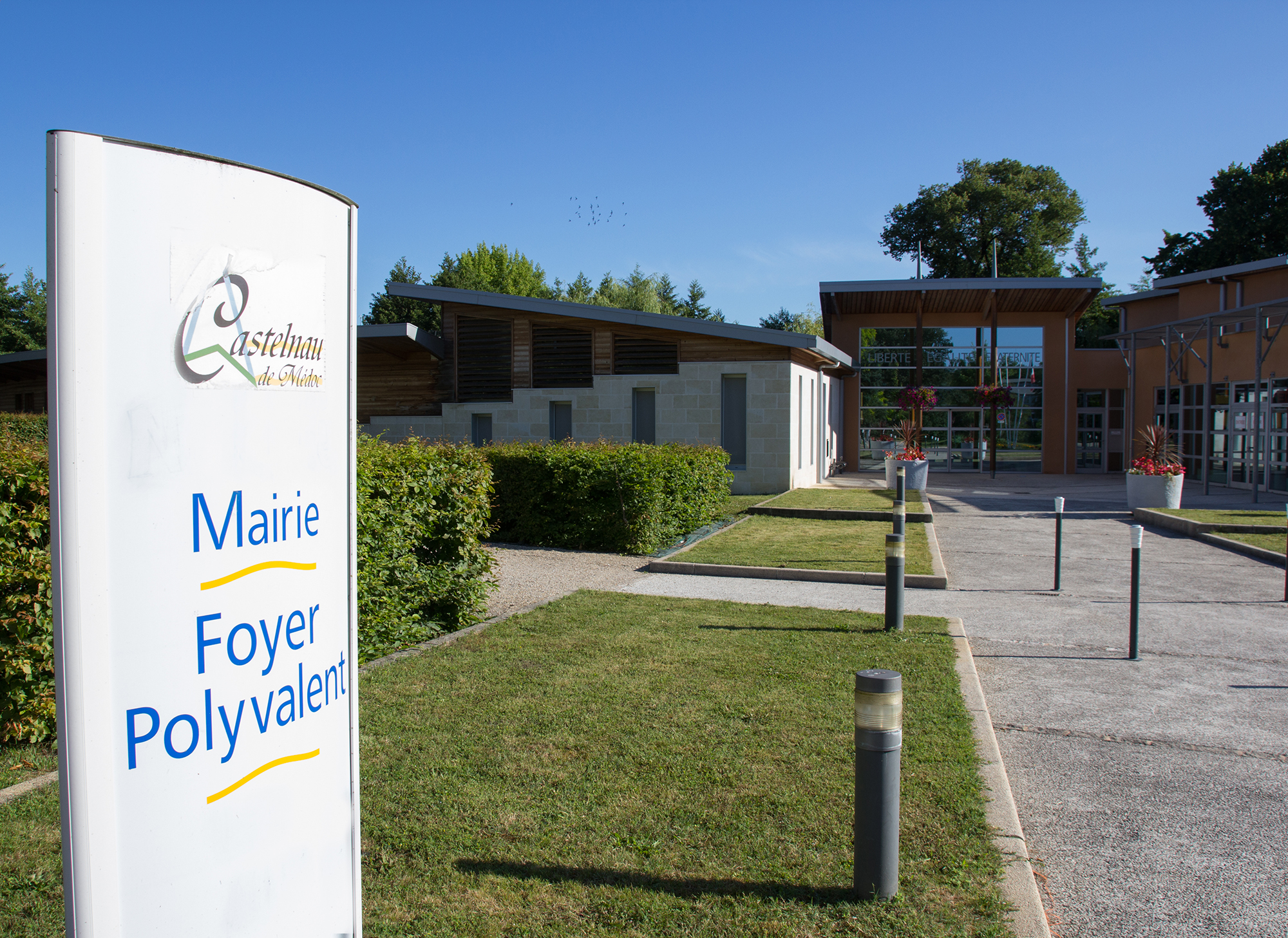 Mairie de Castelnau de Médoc